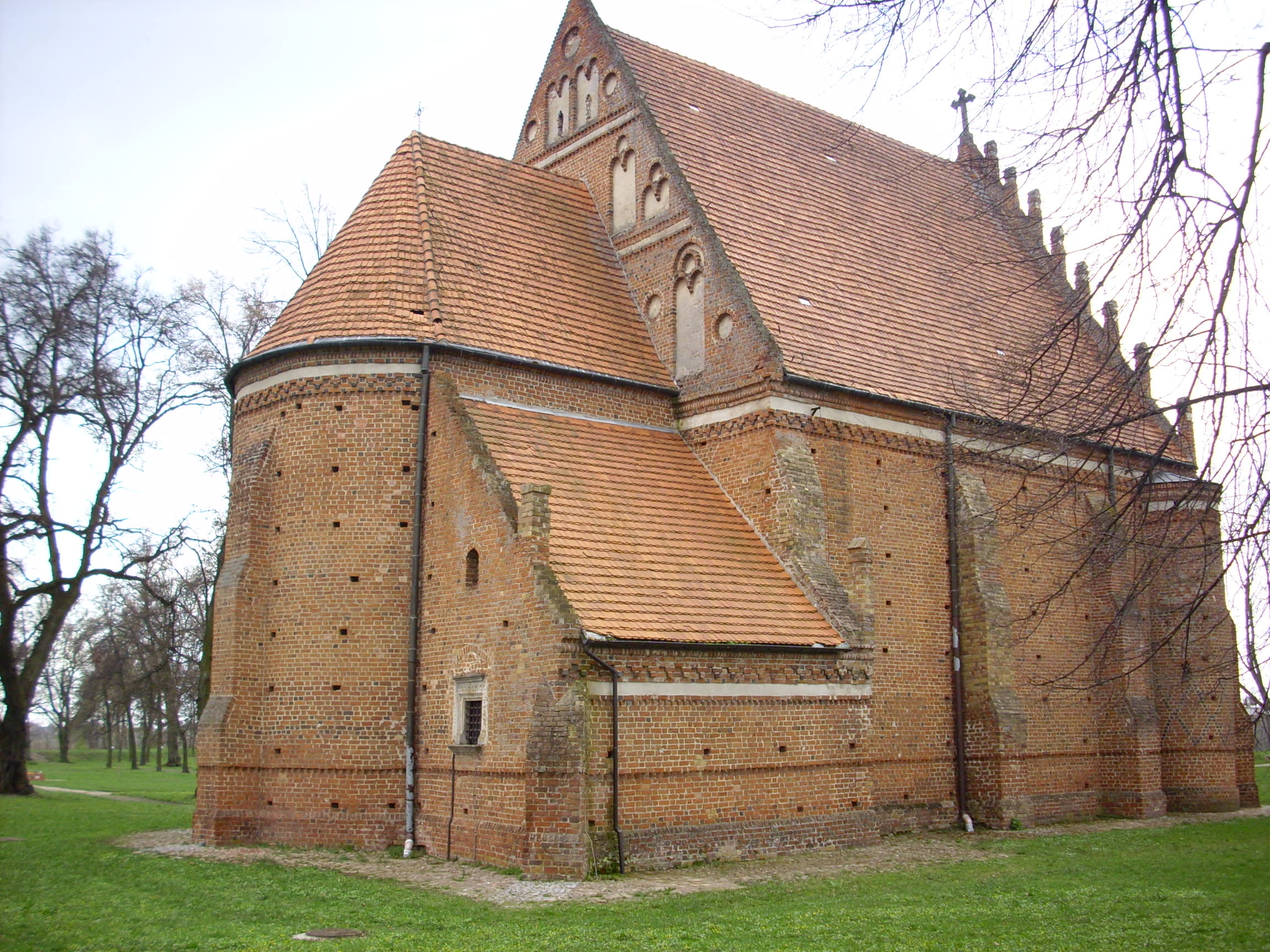 Kodeń. Dawna cerkiew zamkowa.